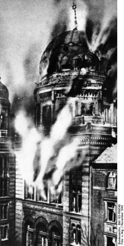 Berlin, Neue Synagoge ADN-ZB/Archiv/04.07.1988 II. Weltkrieg 1939-1945/Berlin 1943: Während der Luftangriffe auf Berlin zwischen dem 22. und 26. November 1943 wurde die Neue Synagoge in der Oranienburger Straße, die bereits 1940 für die faschistische Wehrmacht beschlagnahmt worden war und als Lager für Textilien und Lederwaren gedient hatte, zerstört. Information added by Wikimedia users.Das Bild ist angeblich retuschiert aus einem Vorkriegsfoto der unzerstörten Synagoge, das 1947/48 übermalt worden sein soll